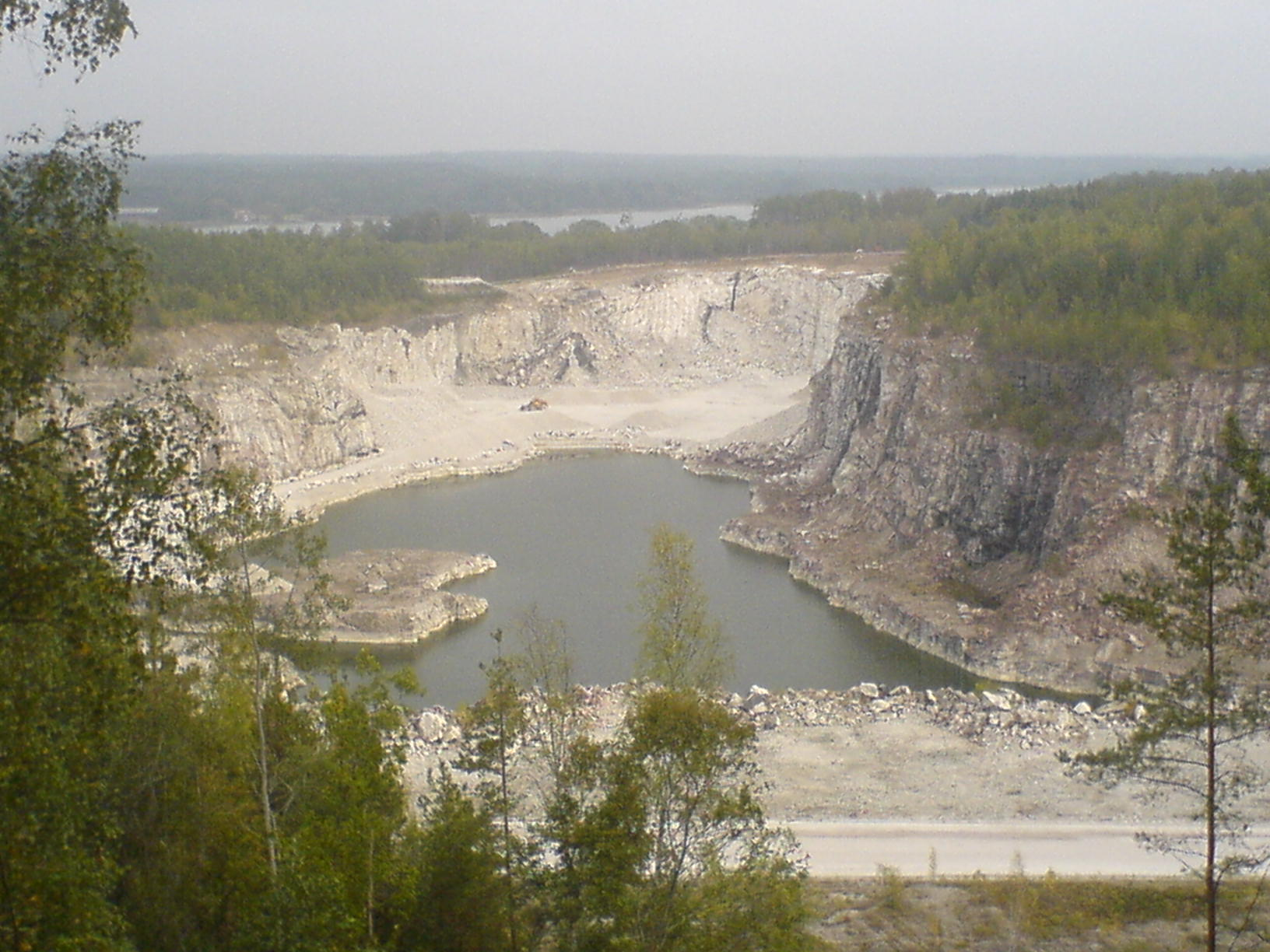 forsby kalkbrott